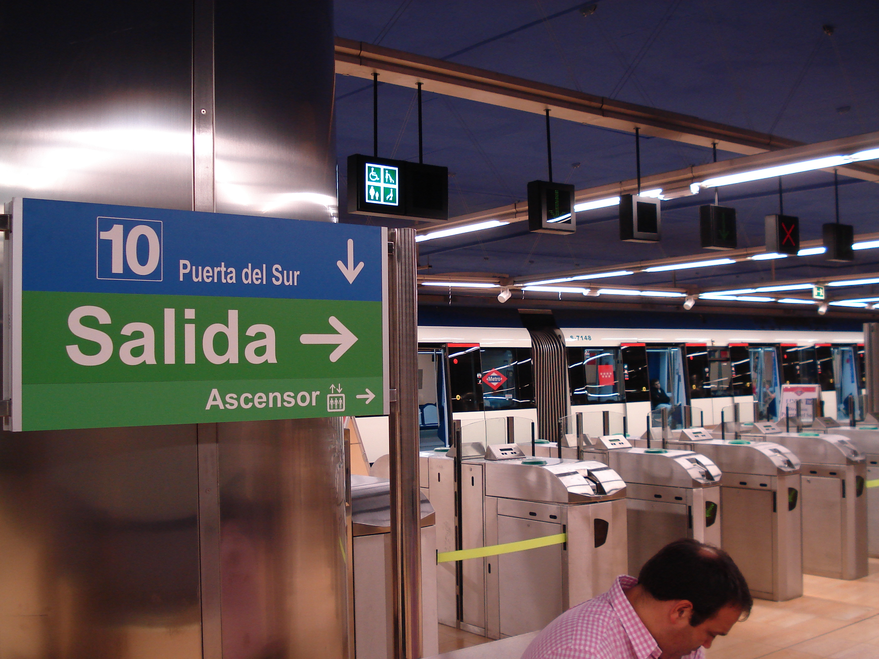 Imagen de la estacion de Tres Olivos de Madrid